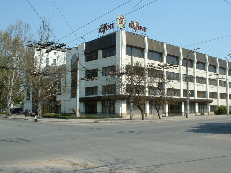 Завод KVINT